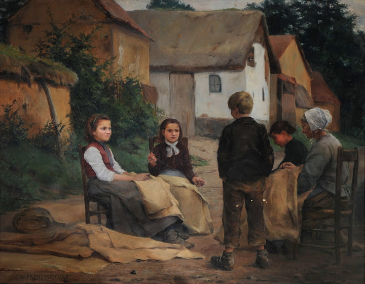 Peinture à l'huile de Jean de FRANCQUEVILLE